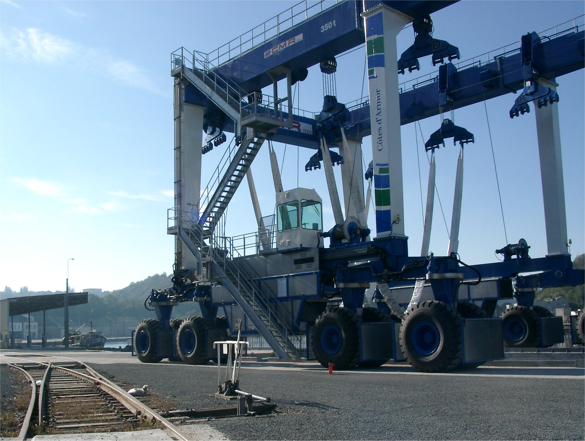 Engin de levage dans le port du Légué (Saint-Brieuc)